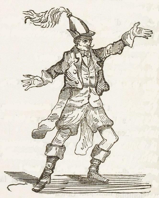 Portrait de Chicard, célébrité du Carnaval de Paris